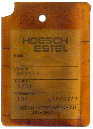 Scan eines Original Werksausweises der Hoesch Estel